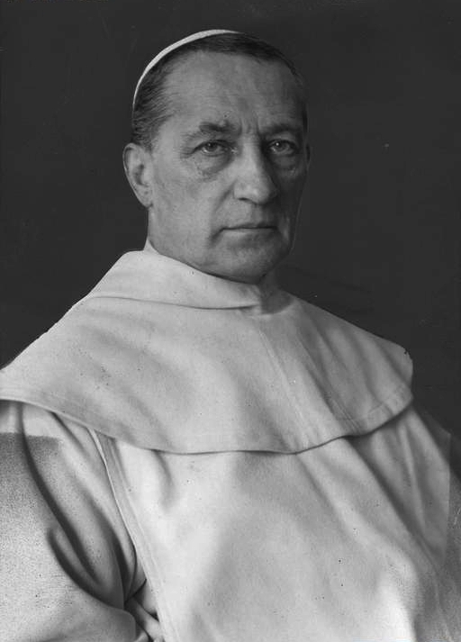 O. Pius Przeździecki - generał Zakonu Paulinów.